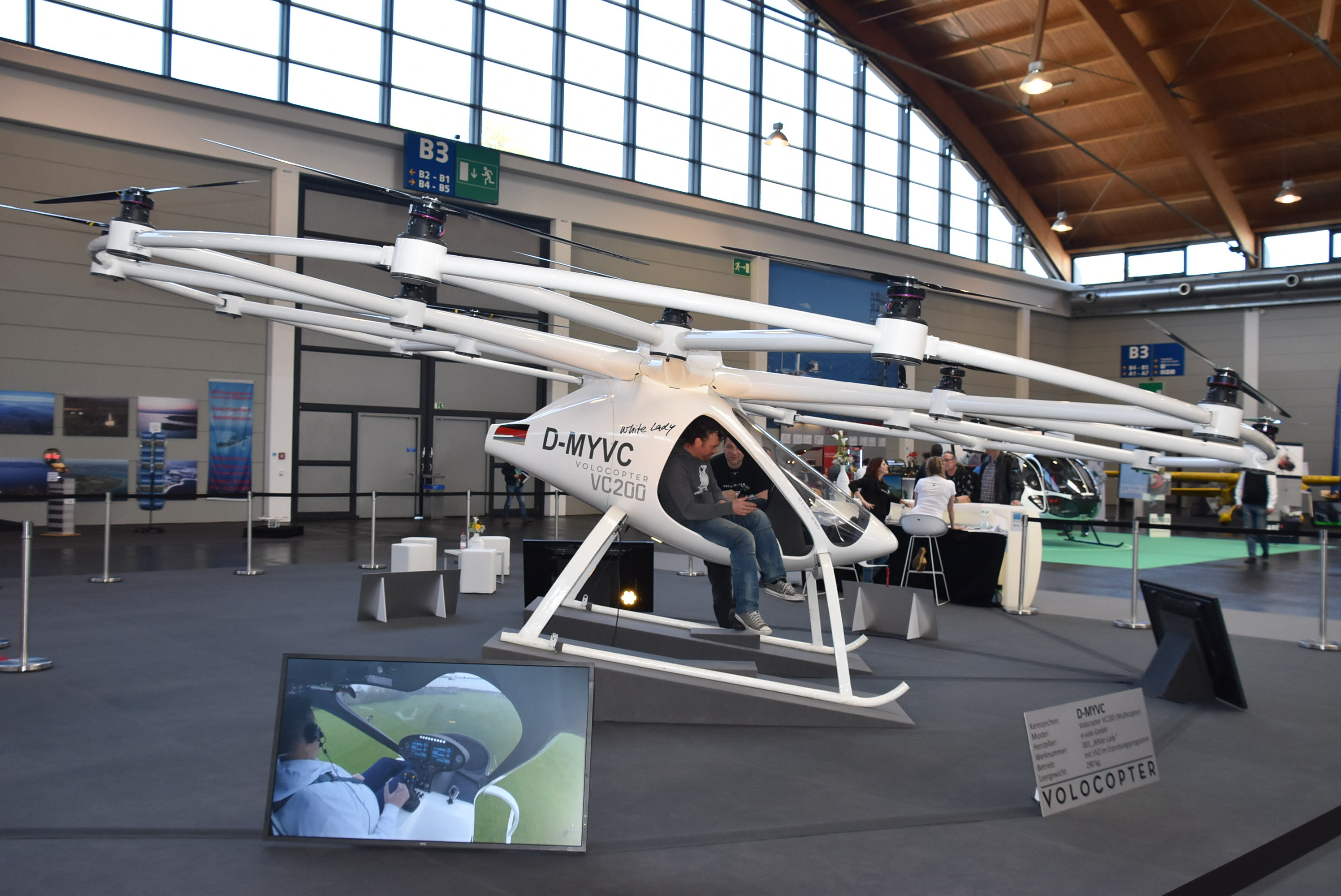 Volocopter VC200 at Aero2016,Messe Friedrichshafen, Germany, 20/04/16.